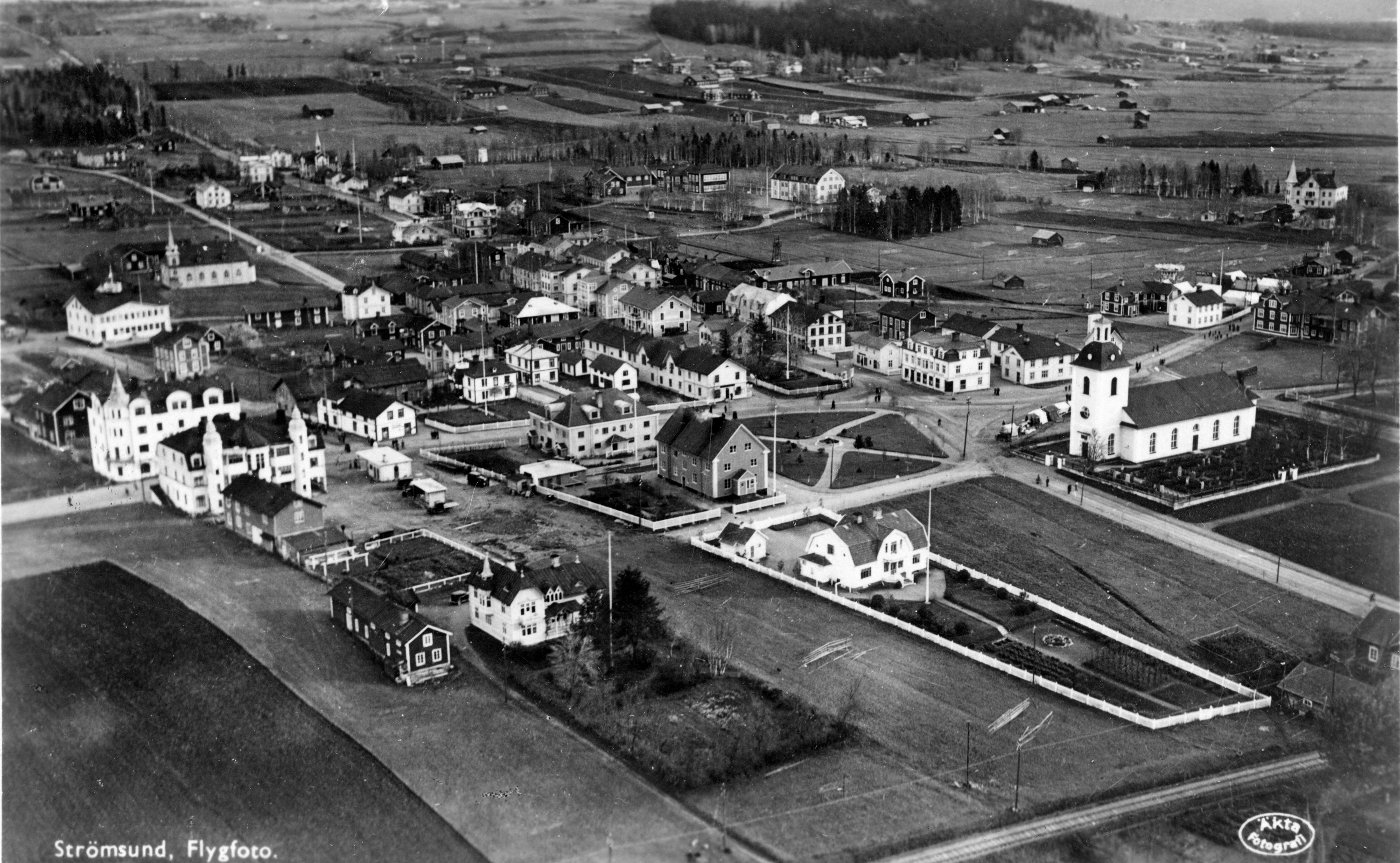 Ett av dom första flygfotona över Strömsunds samhälle år 1932. Detta foto togs i samband med att flygkapten Albin Ahrenberg besökte Strömsund med sitt Junkeraeroplan.